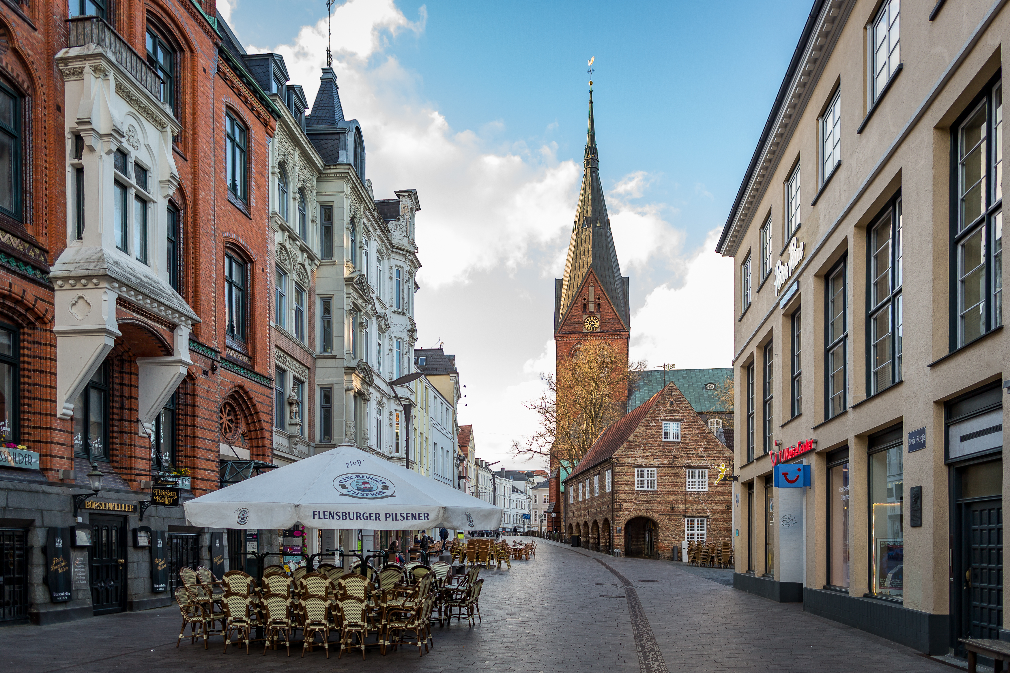 Die Große Straße in Richtung des Nordermarktes